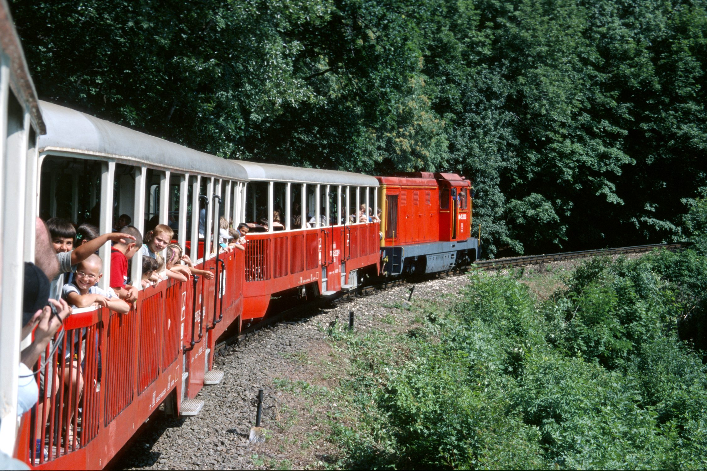 Train of the Budapest Children Railway - Zug der Budapester Kindereisenbahn